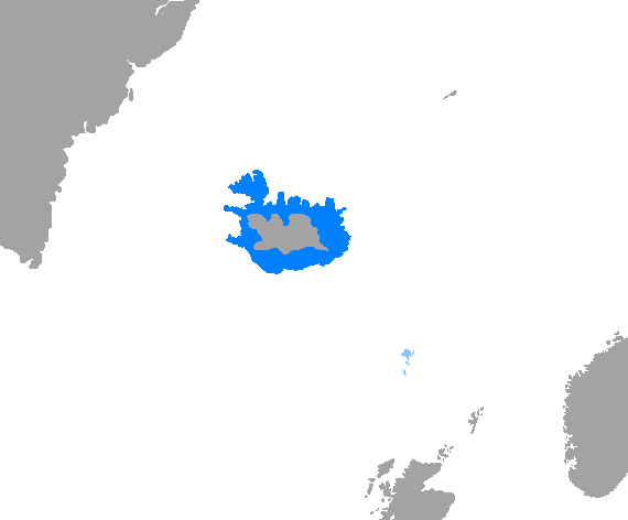 Idioma islandés.